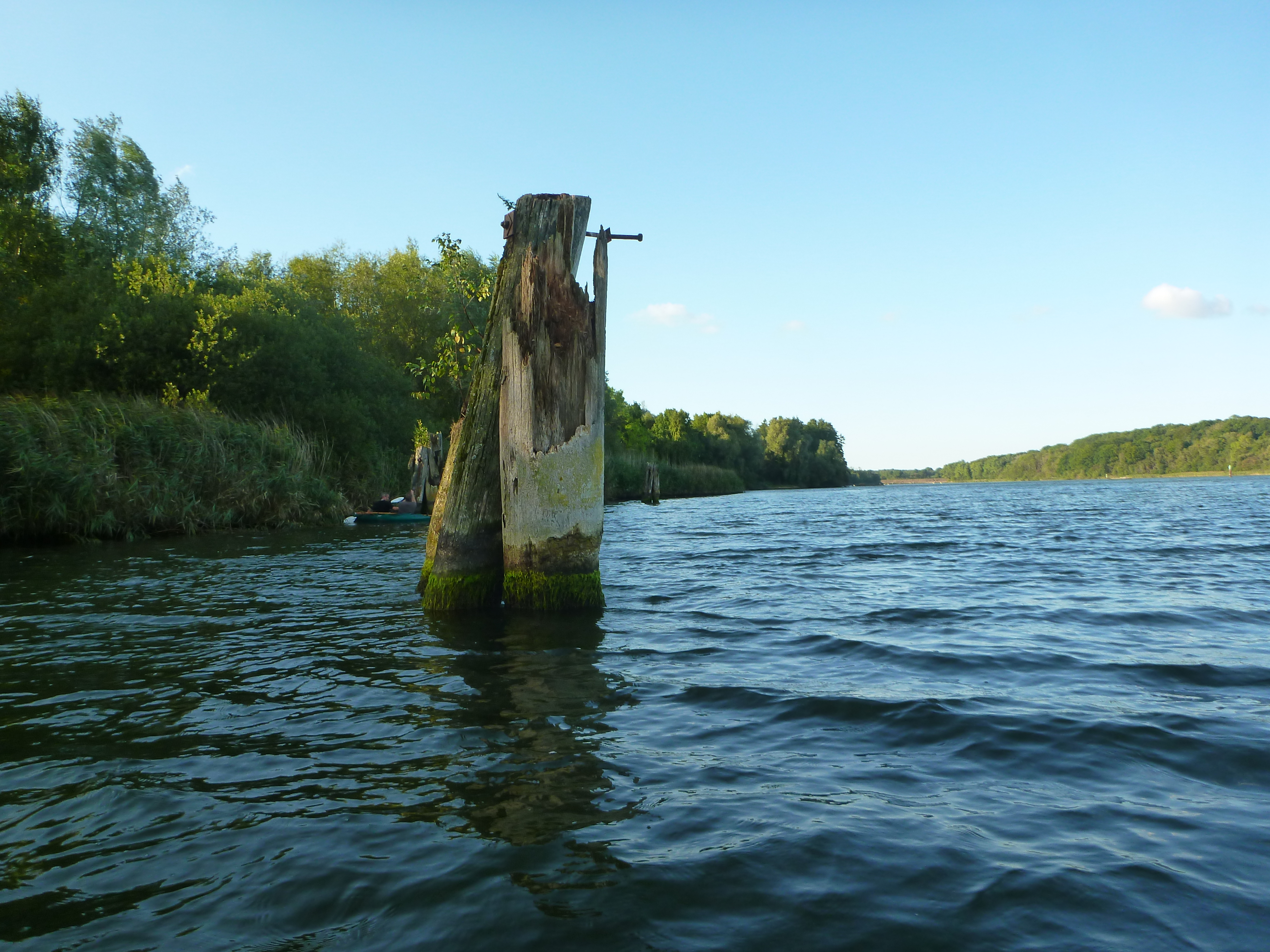 Alte Duckdalben im Flemhuder See